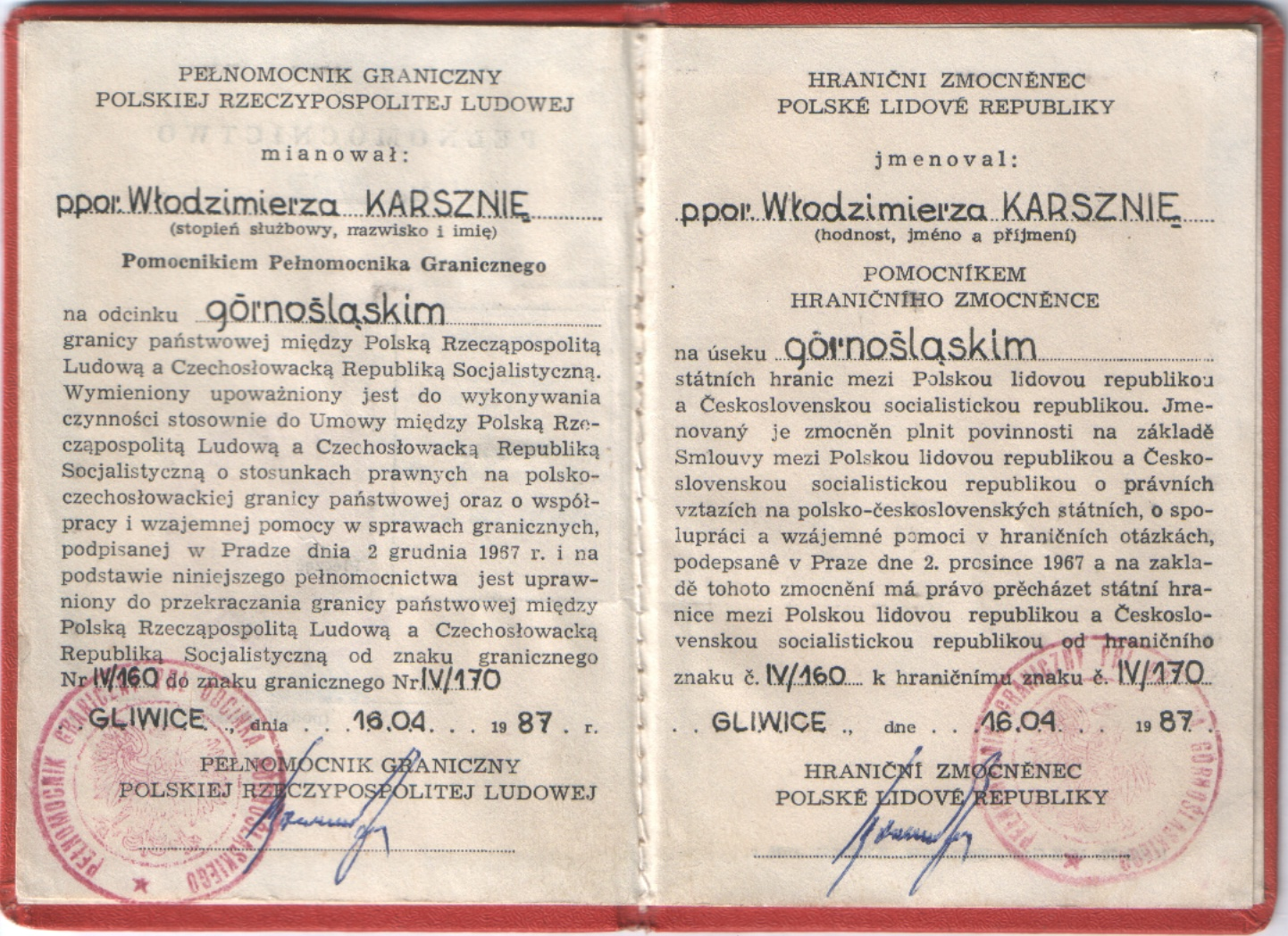 Pełnomocnictwo graniczne (2–3) na odcinek granicy od znaku granicznego nr IV/160 do znaku granicznego nr IV/170 na granicy polsko-czechosłowackiej, odcinek strażnicy WOP Gierałcice